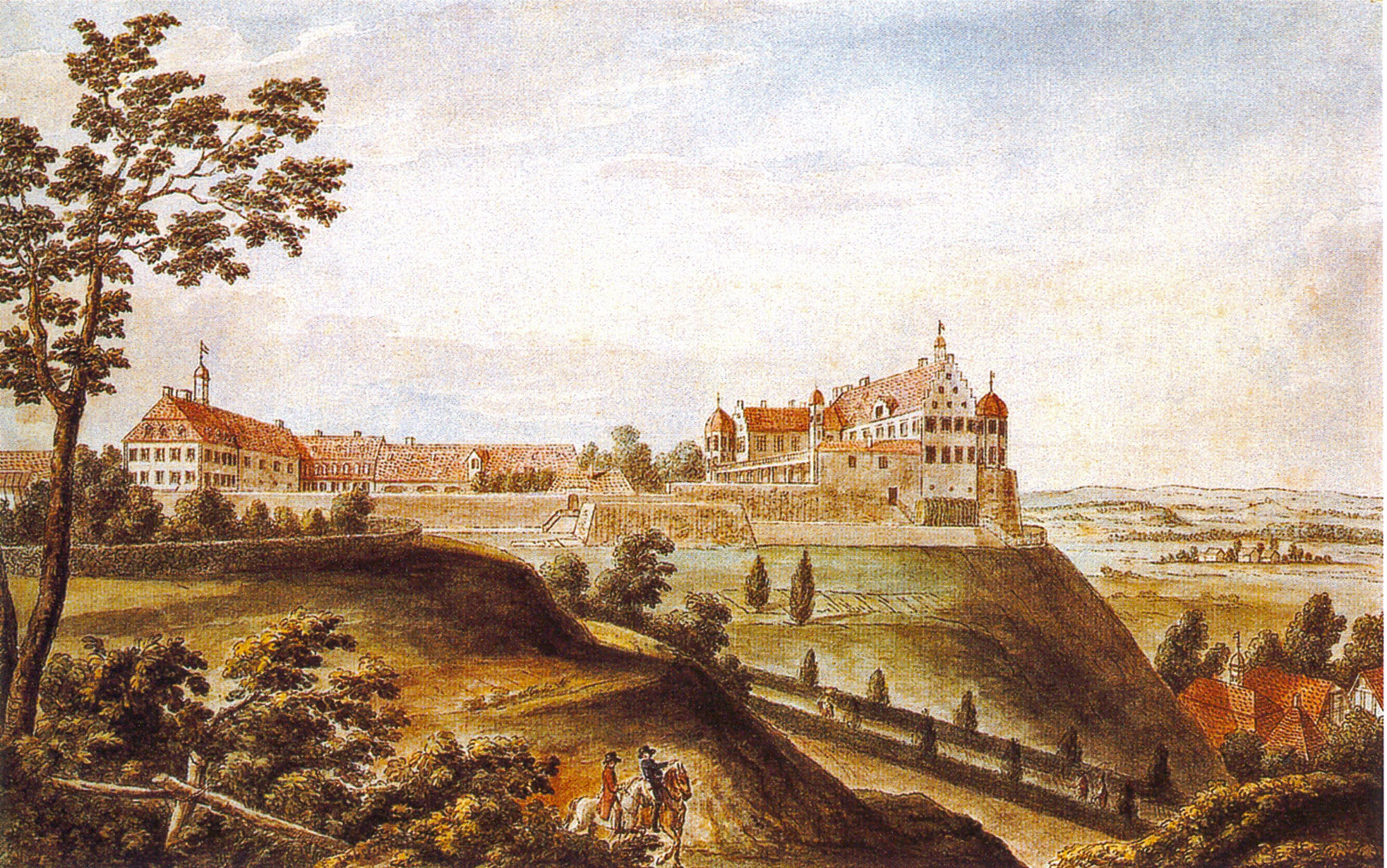 Schloss Warthausen der Grafen von Stadion und später der Freiherren von König-Warthausen Kolorierte Radierung